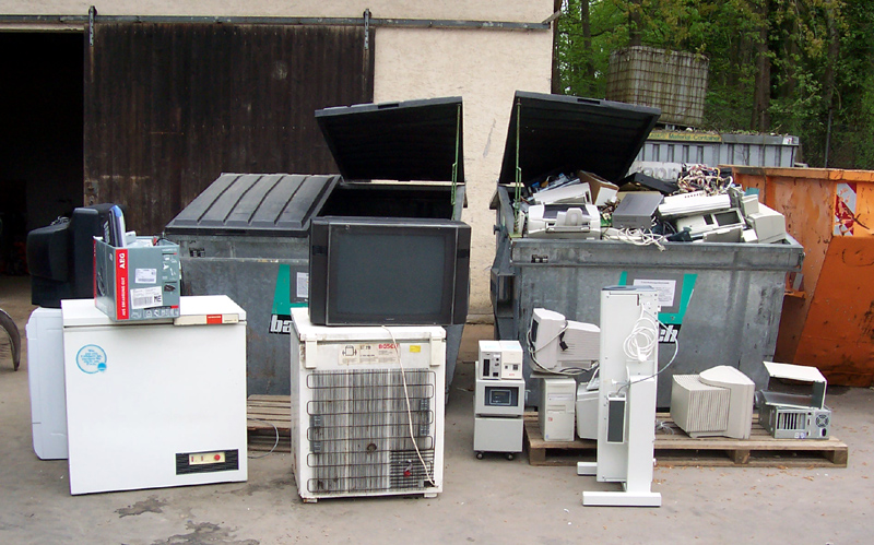 Ein Elektronikschrott-Container irgendwo in Deutschland